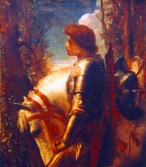 Sir Galahad, detalj fra et maleri av George Frederic Watts